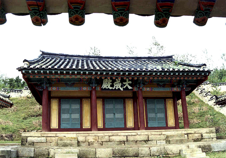 충청북도 유형문화재 제101호 진천향교 (鎭川鄕校)